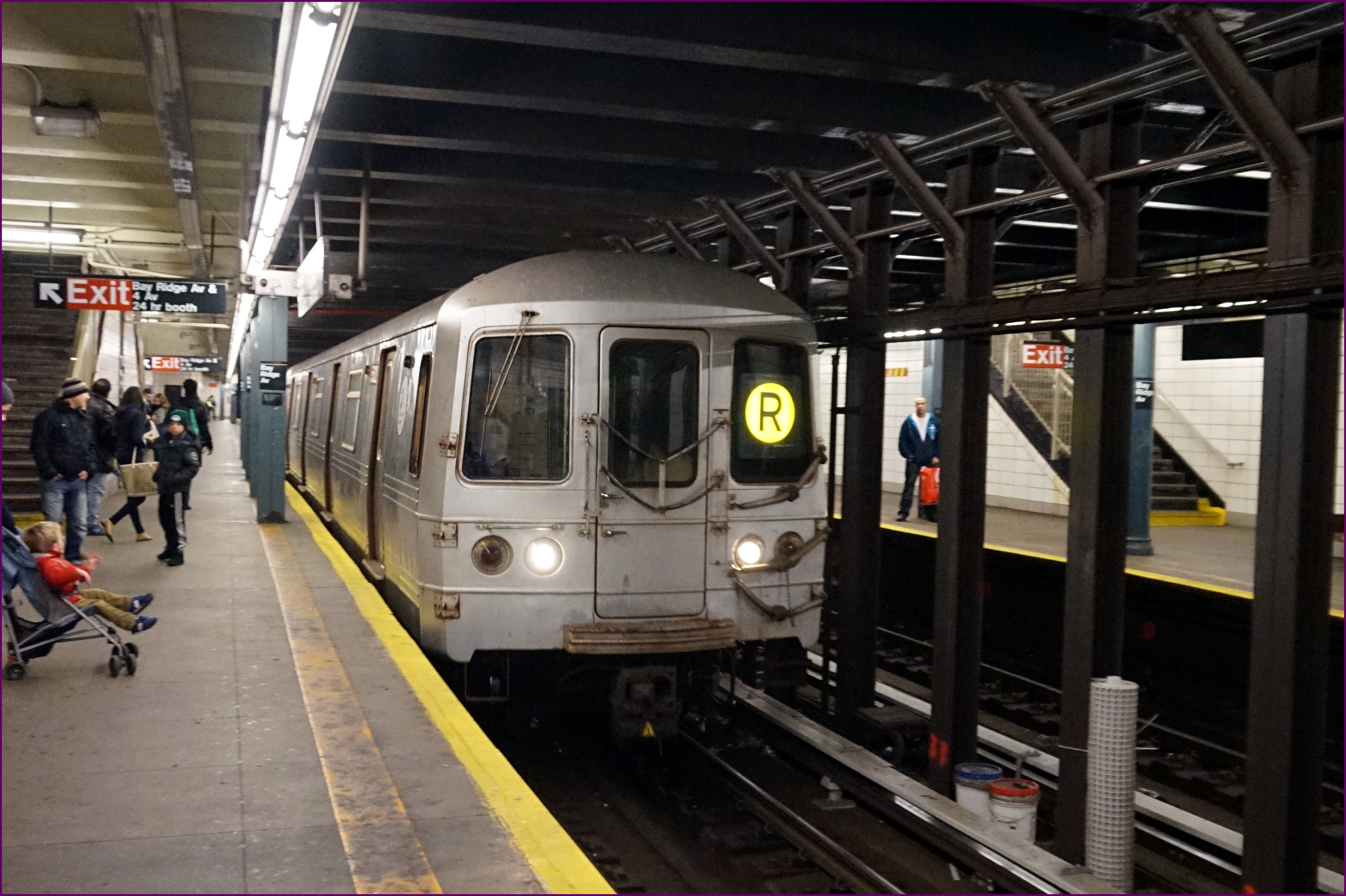 Bay Ridge